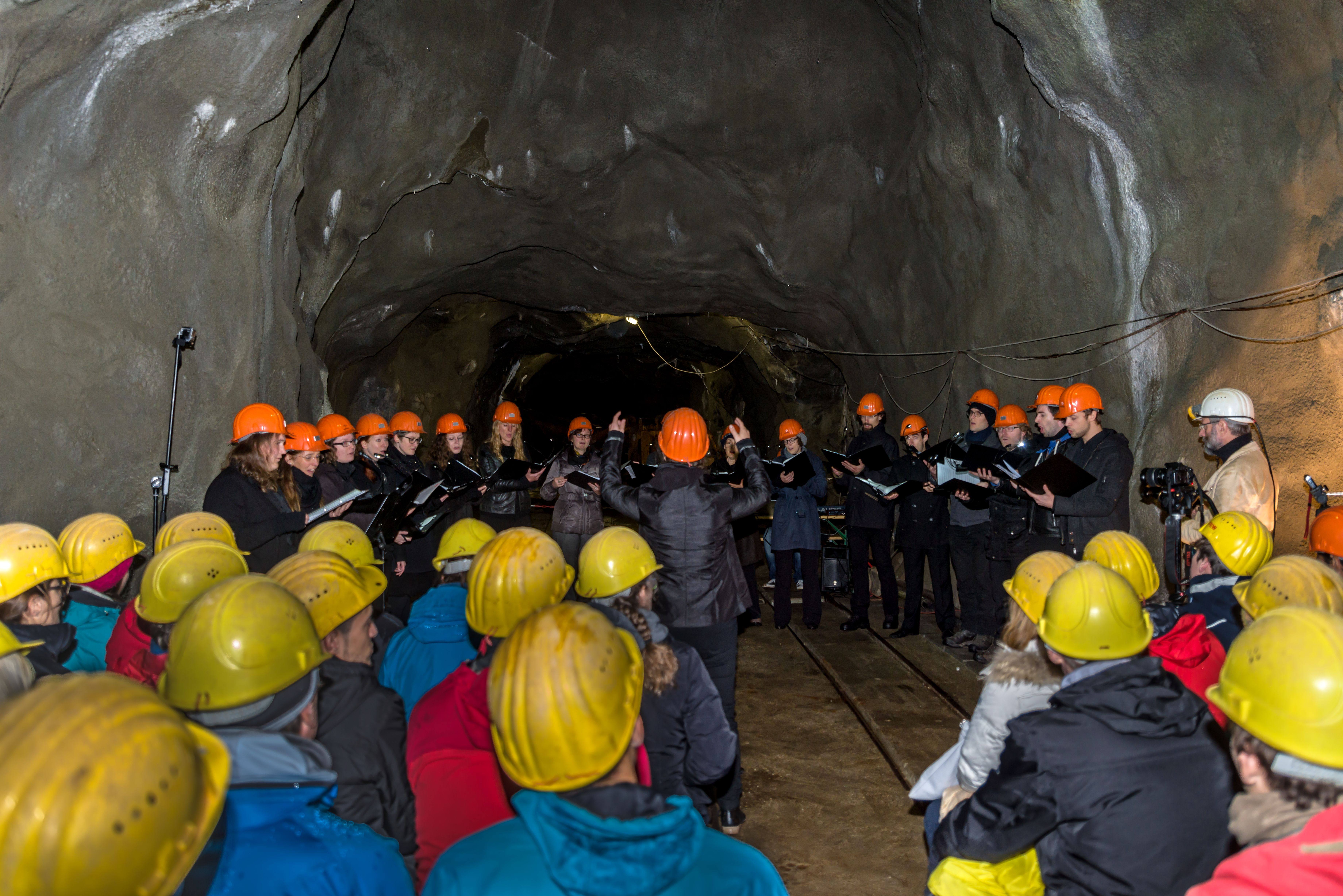 Bilder vom Schauinsland bei Freiburg Konzert des Neomania Ensemble Freiburg im Museumsbergwerk Schauinsland am 09. Oktober 2016. Das Ensemble ist ein Acapella Chor mit 22 Mitglieder